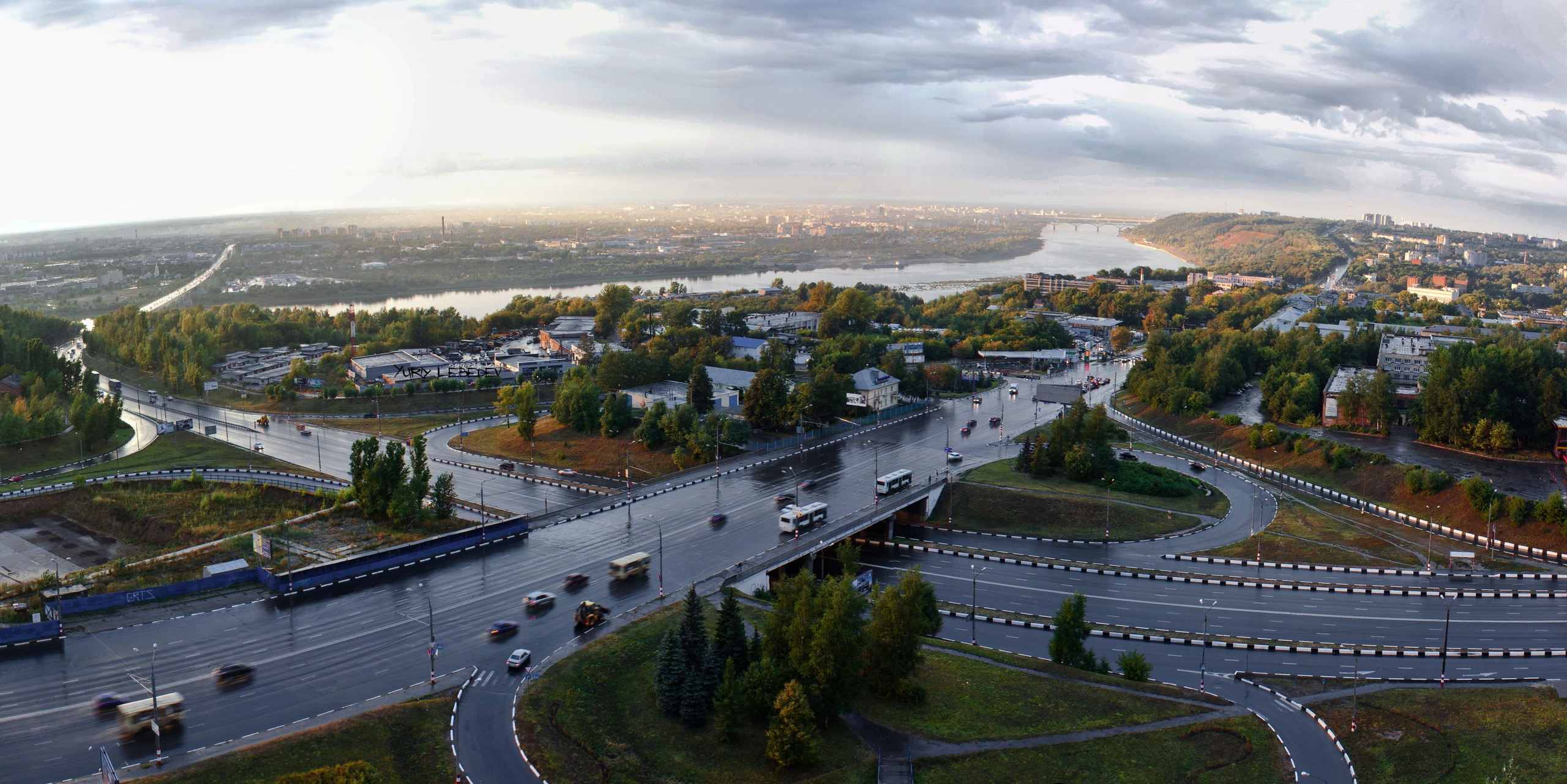 Проспект Гагарина и трасса М7 в Нижнем Новгороде